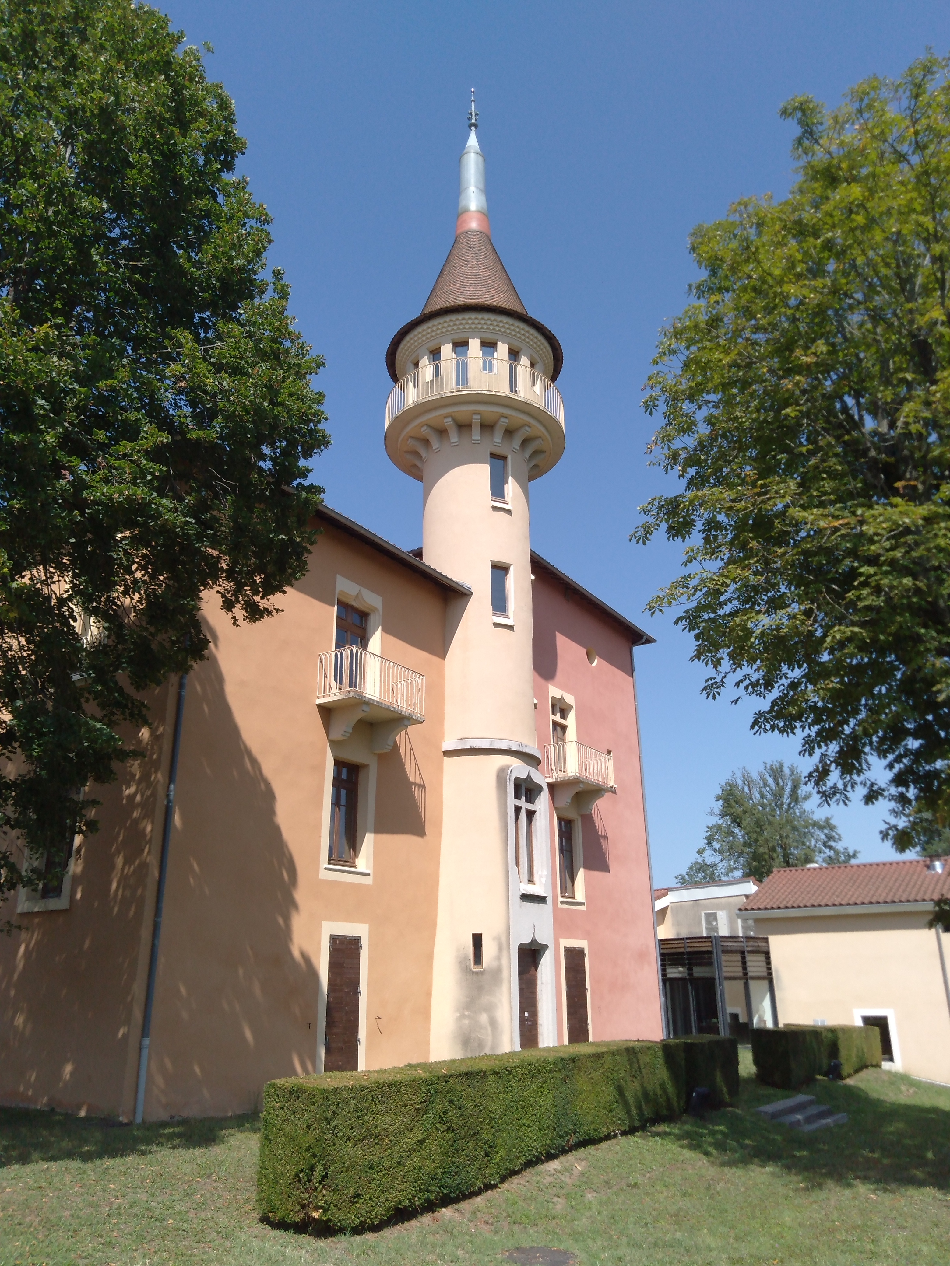 Château de La Veyrie en août 2019